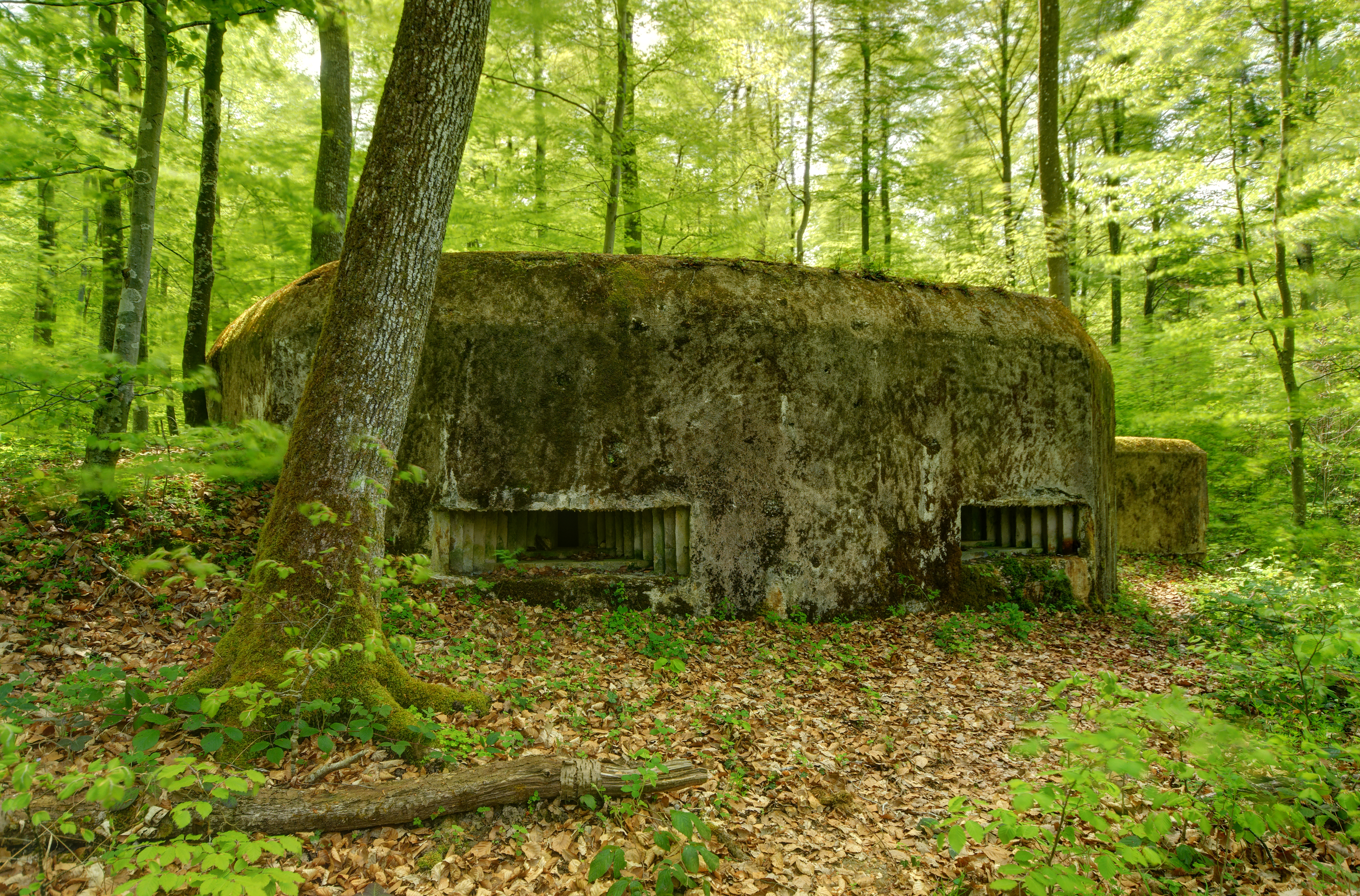 La "Villa Agathe", à Pfetterhouse. Photo réalisée avec un filtre ND1000 + un filtre polarisant.